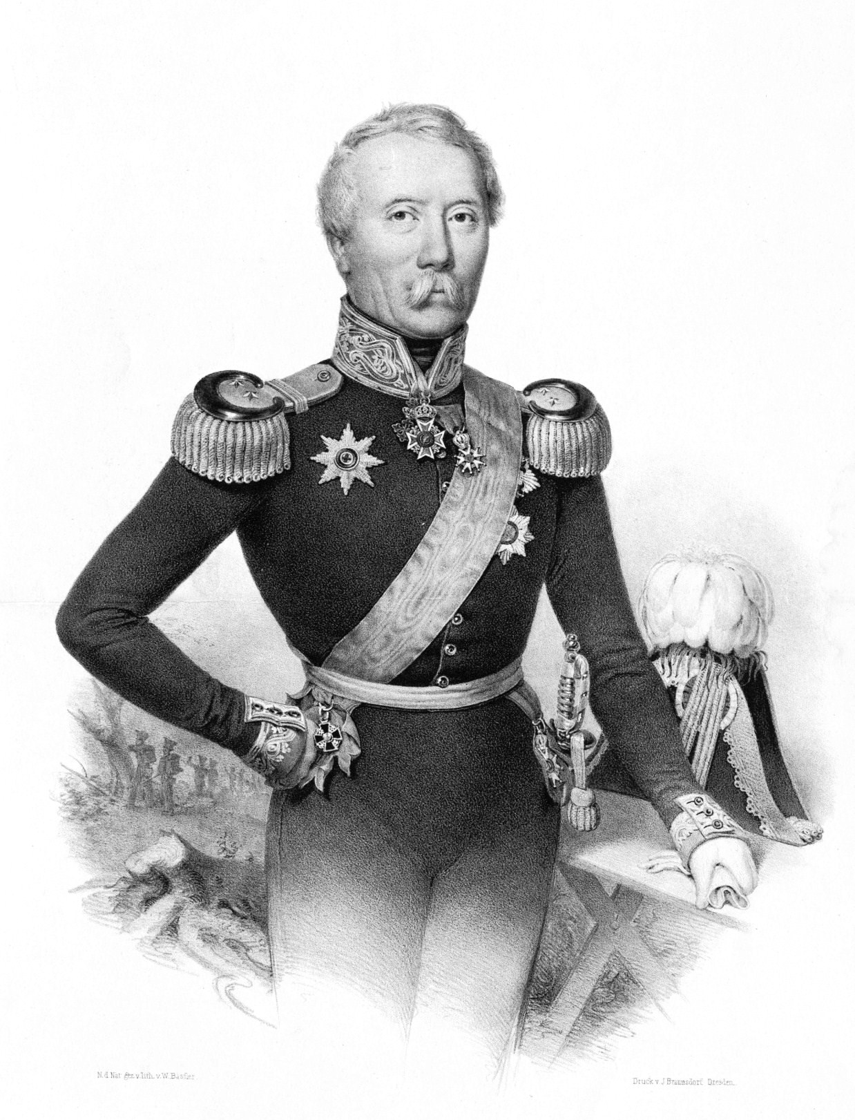 Freiherr Clemens Franz Xaver Cerrini de Monte Varchi, Königlich Sächsischer Generalleutnant